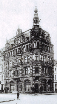 Partie_am_Kaiser_Wilhelm_Denkmal,_Geschäfte_Kreuzung.jpg